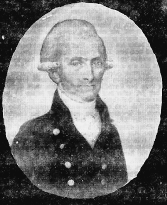 Johann Balthasar Thieme, 1751 - 1841, Bürgermeister Radeberg 1799 - 1806